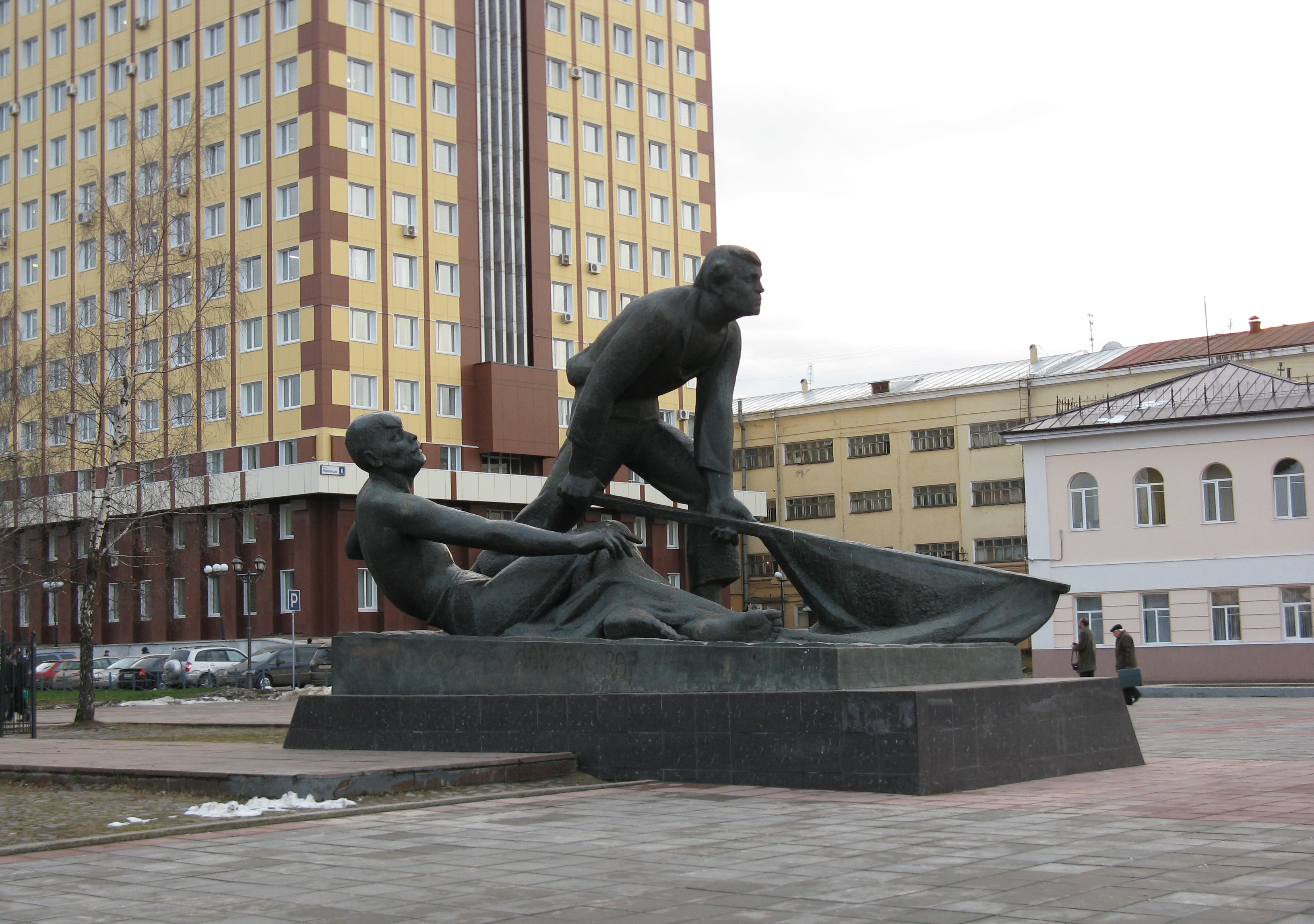 Памятник на площади Революции в честь погибших 3 ноября 1905 года. На заднем плане - здание Ивановской городской администрации.